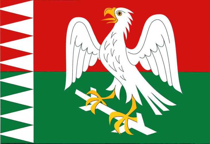 Otín, okres Jihlava, vlajka